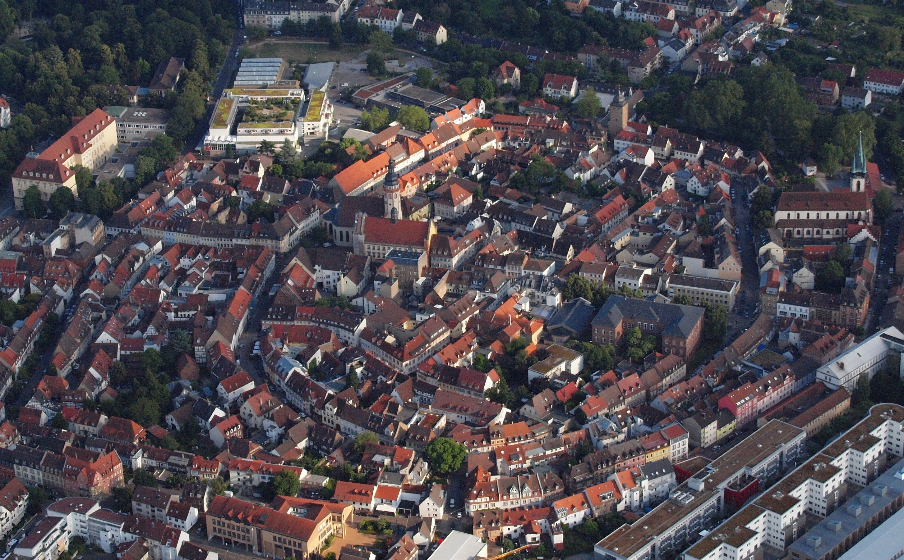 Durlach: Luftaufnahme aus nördlicher Richtung